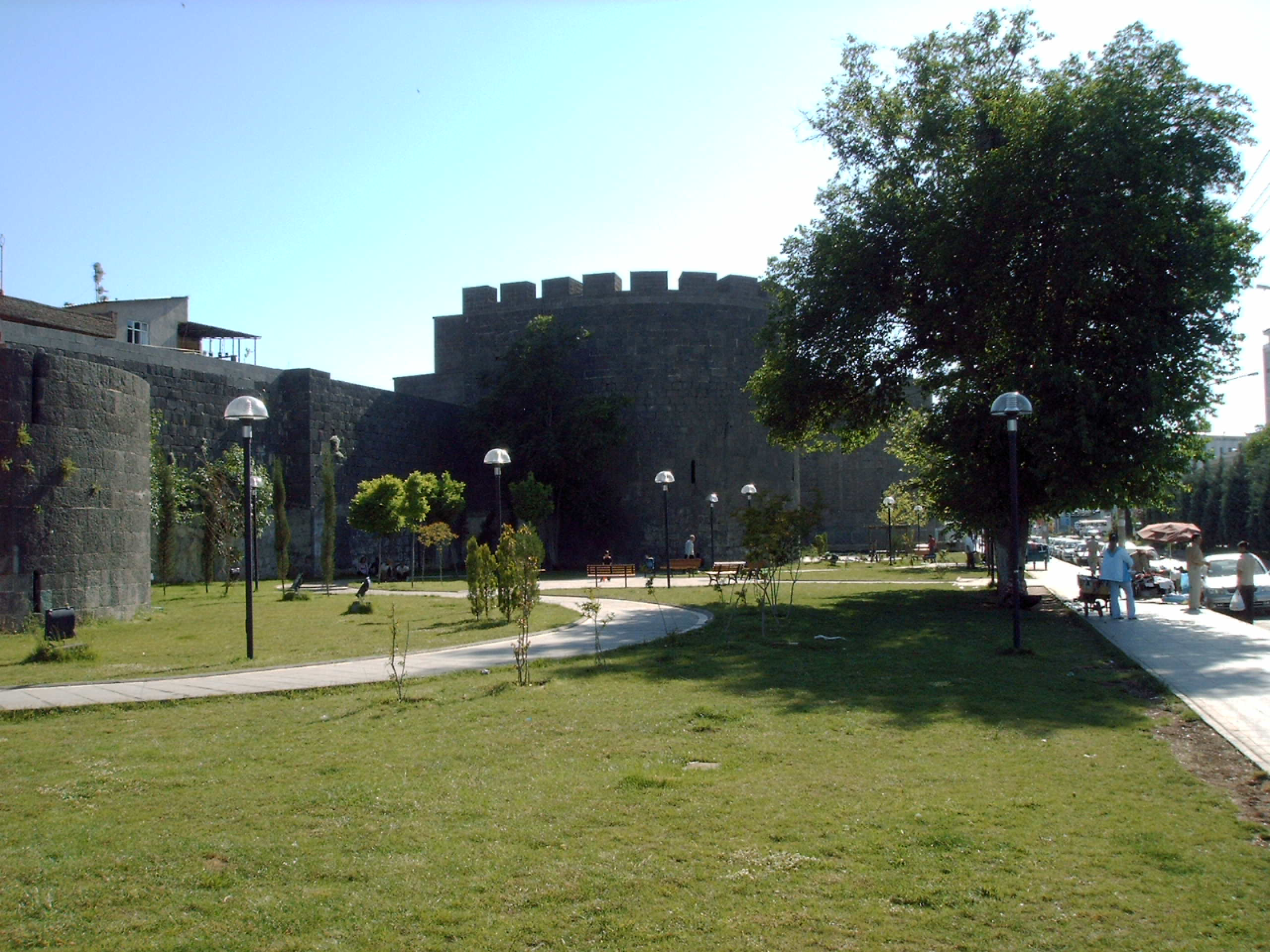 Diyarbakır Surları